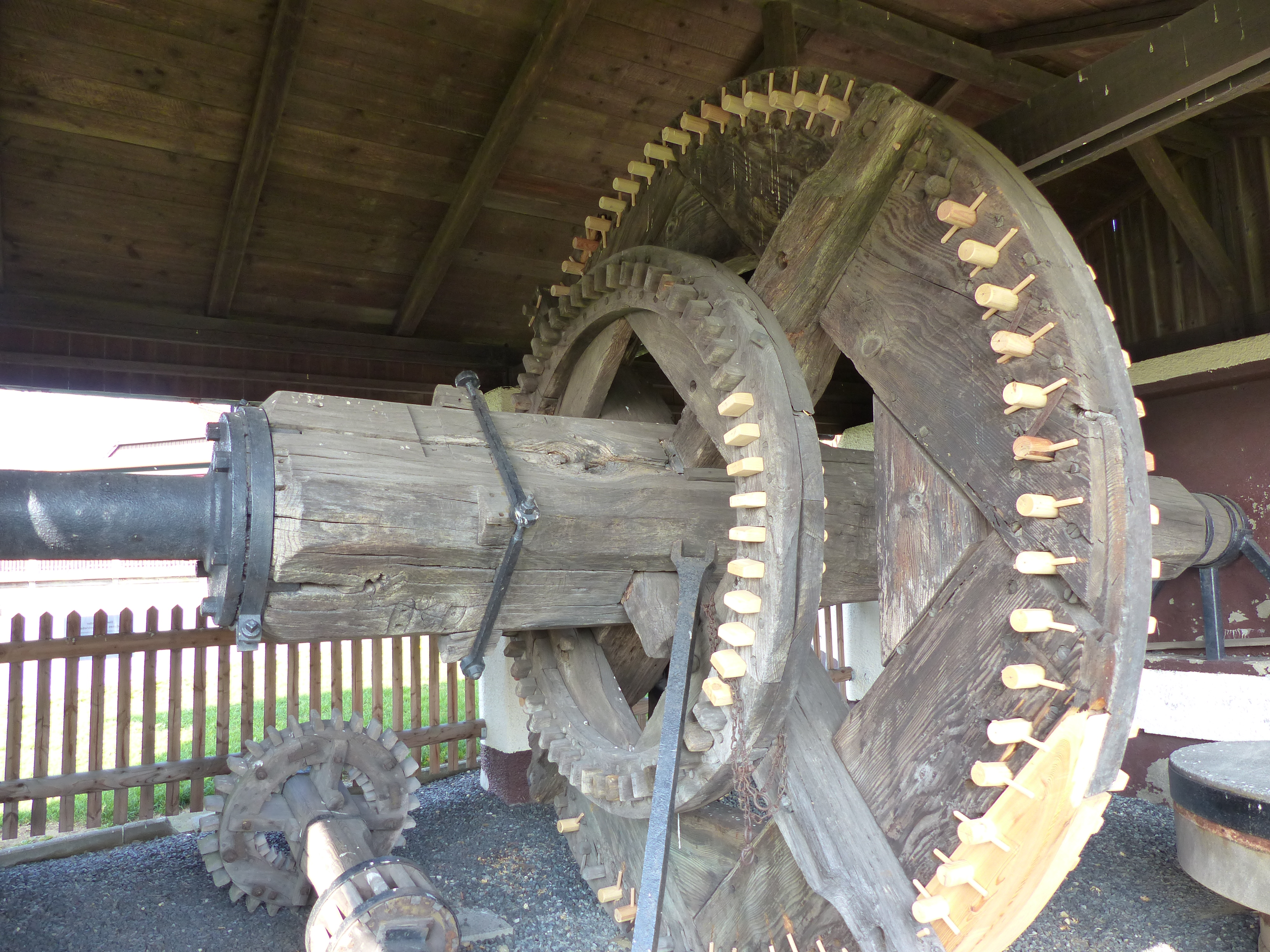 Kottmarsdorfer Windmühle, Burkmühle, Korttmarsdorf